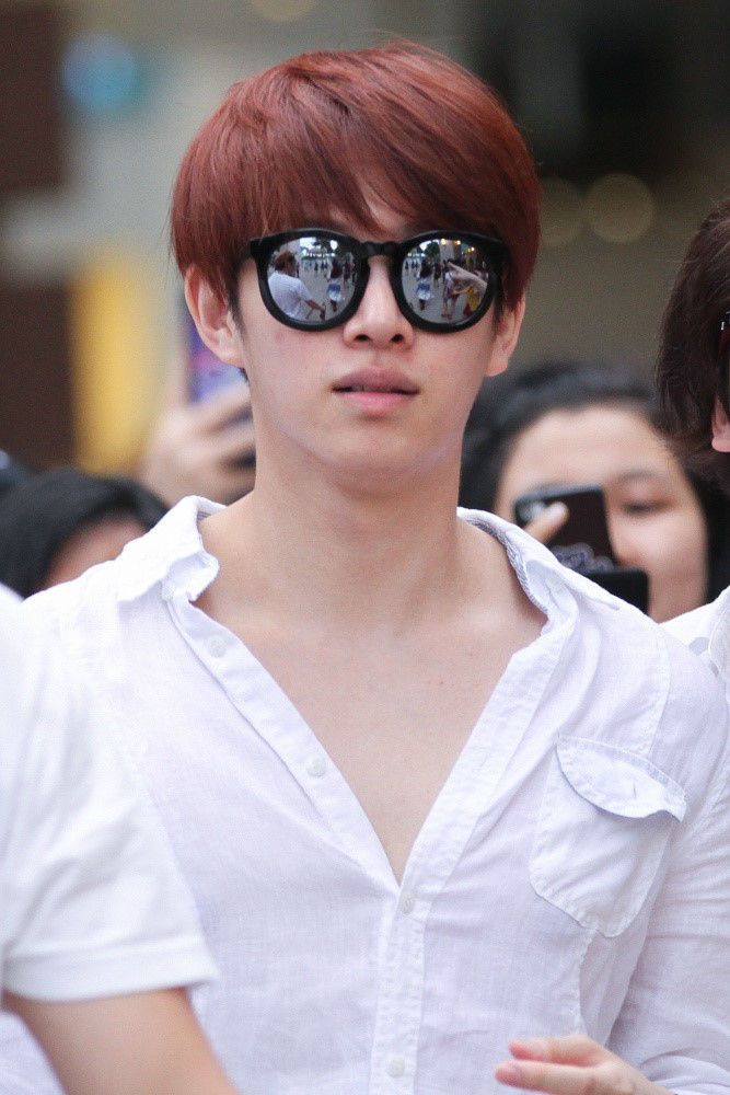 130807 유니버설 스튜디오 싱가포르